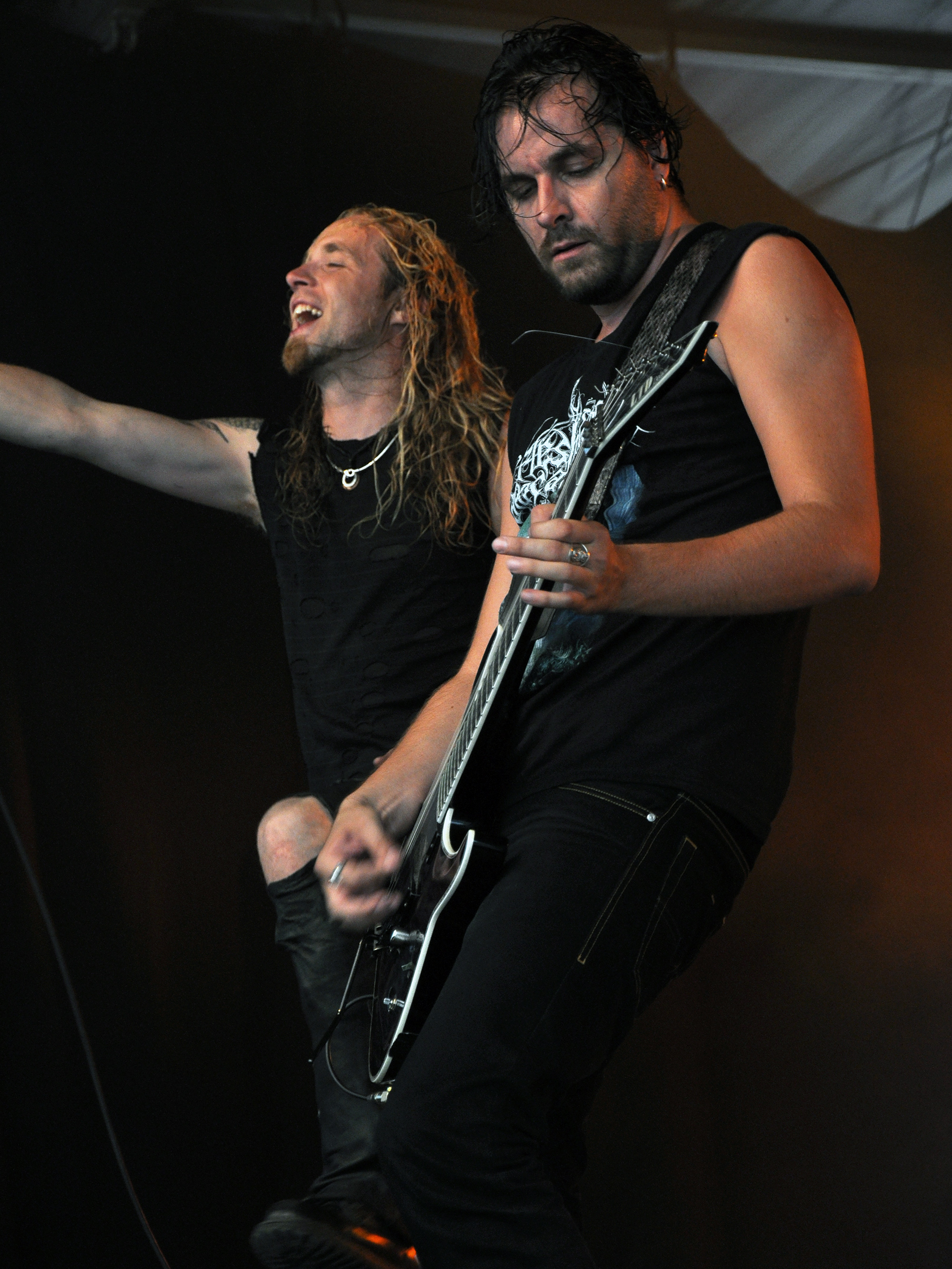 Keep of Kalessin au Metal Mean Festival, le 20 08 2011, à Méan (Bel).